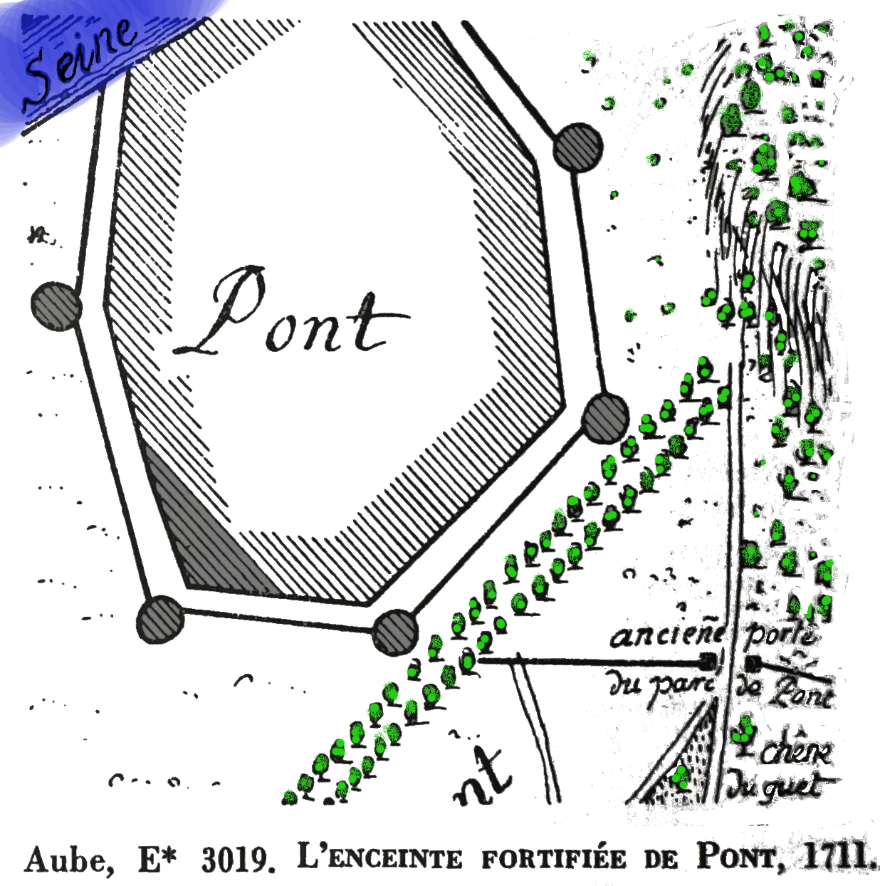 issu des collections des archives de l'Aube.